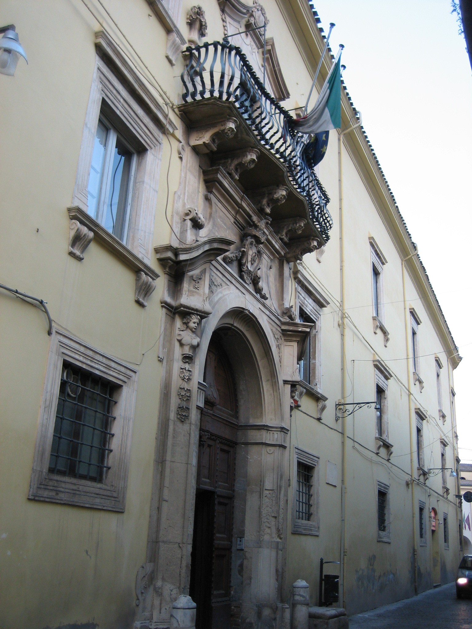 Palazzo Aliprandi a Penne (Pescara)